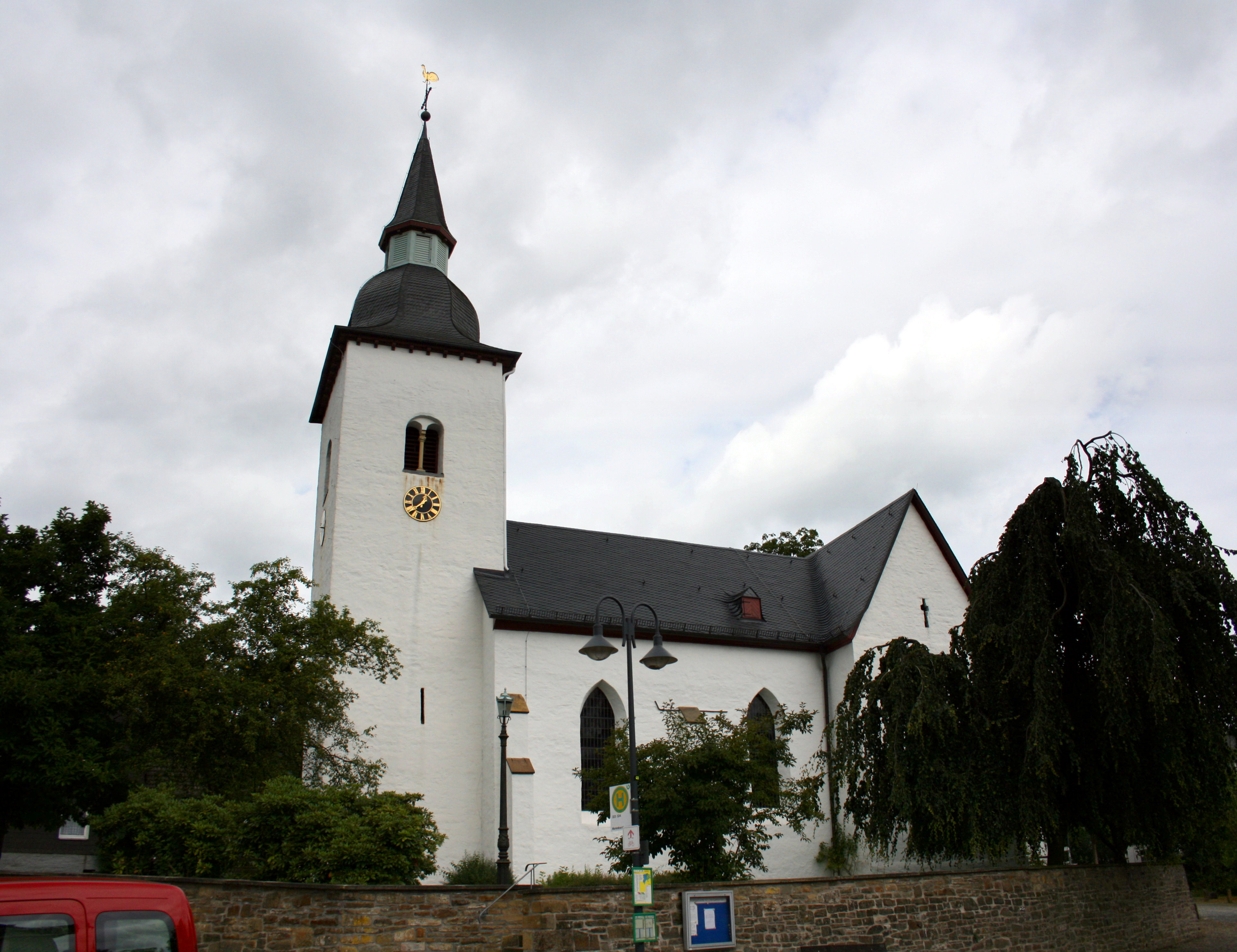 Evangelische Kirche in Nümbrecht-Marienberghausen